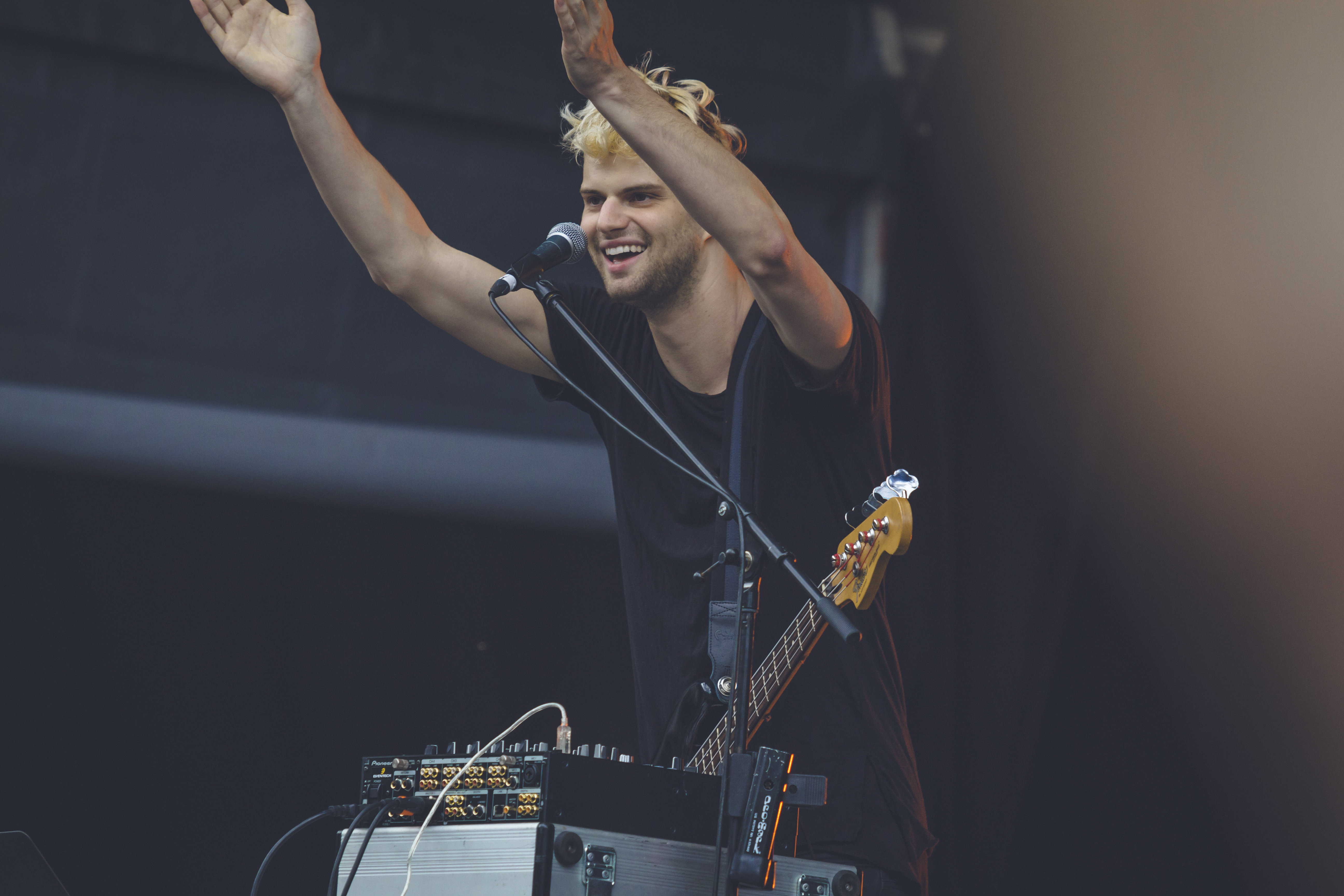 POS16_F6_SOFI TUKKER_2